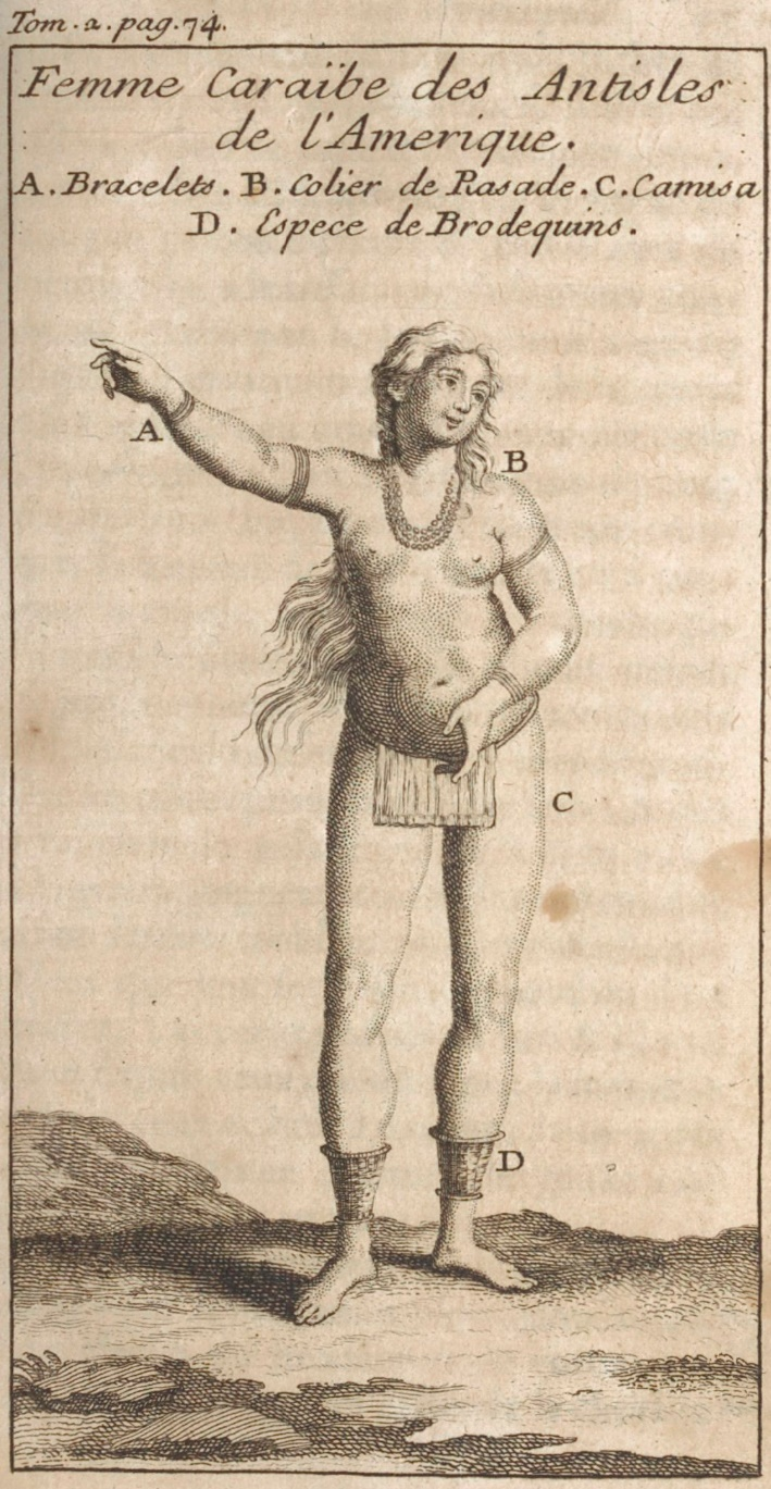 « Femme Caraïbe, des Antilles de l'Amérique ». Gravure publiée en 1742 dans le Nouveau voyage aux isles de l'Amérique. Contenant l'histoire naturelle de ces pays, l'origine, les mœurs, la religion & le gouvernement des habitants anciens & modernes. Les guerres & les événements singuliers qui y sont arrivez pendant le séjour que l'auteur y a fait. Tome 2. Nouvelle édition augmentée considérablement, & enrichie de figures en tailles-douces. Par le Révèrent Père Jean-Baptiste Labat, de l'ordre des Frères prêcheurs.